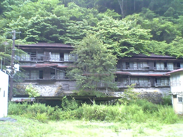 秩父鉱山の住居跡